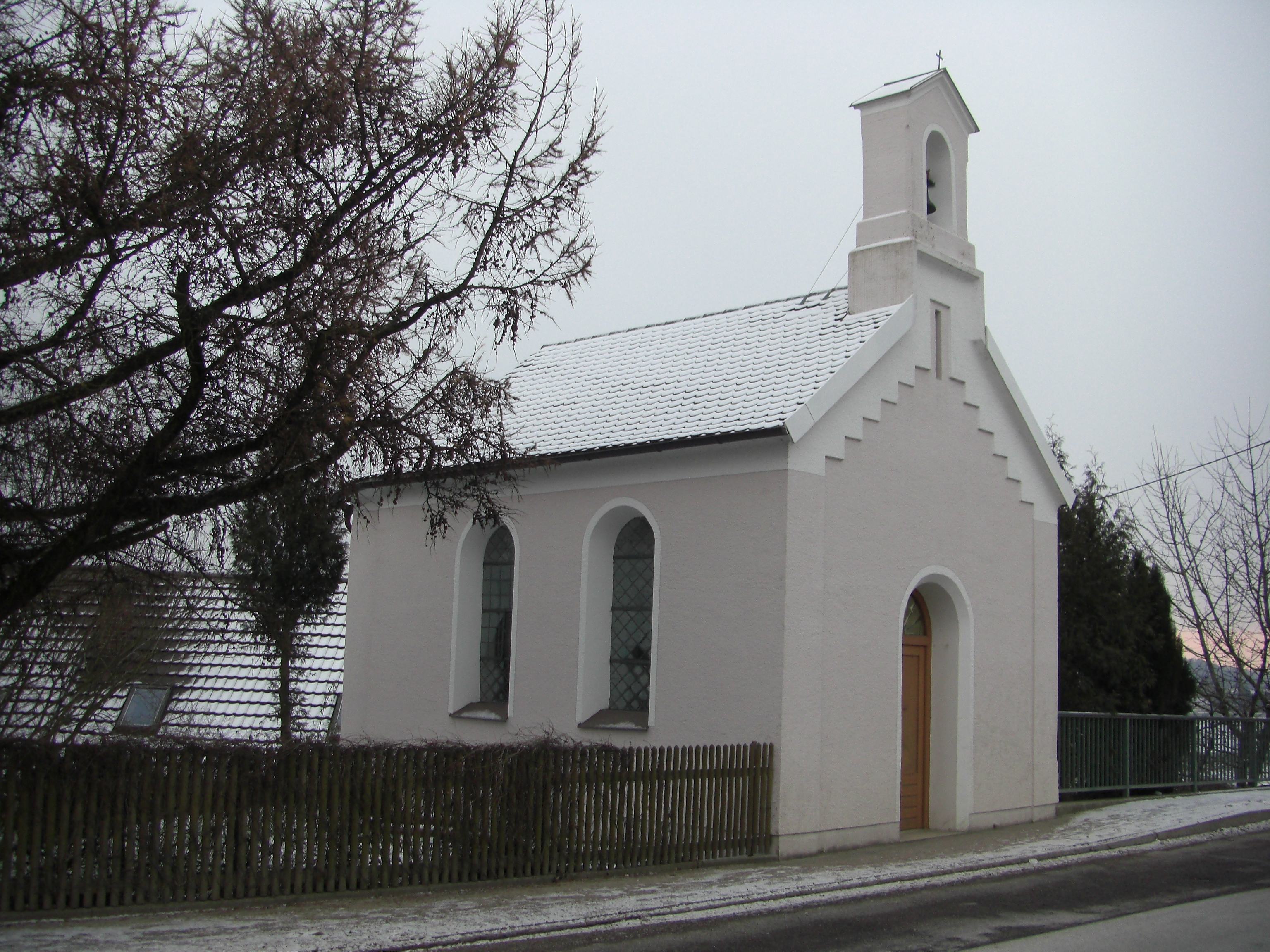 Hausen Kapelle